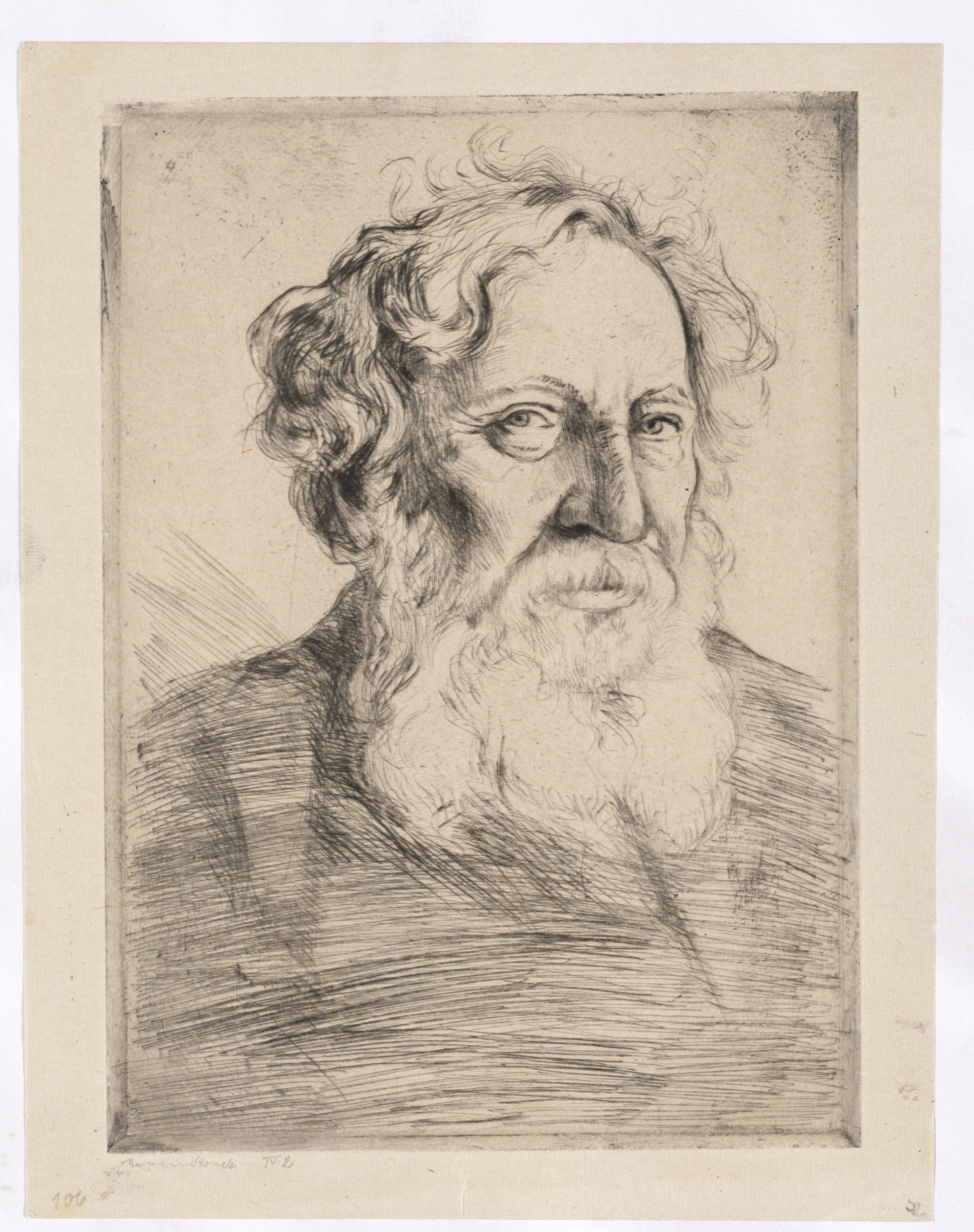 Artwork by Hermann Struck Dargestellte Person: Schechter, Solomon (1847 - 20.11.1915), DNB-Link Datierung Display: 1912 - 1913 Objektart: Radierung Schlagworte Inhalt /Geografie: Mann, Porträt Schlagworte Kontext: Rabbiner, konservatives Judentum